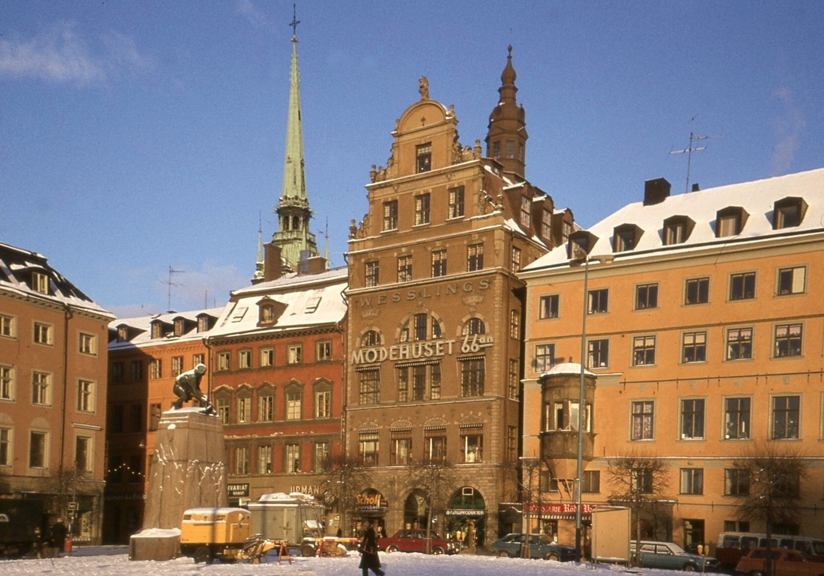 "Modehuset 66" Kornhamnstorg 49/Västerlånggatan 66